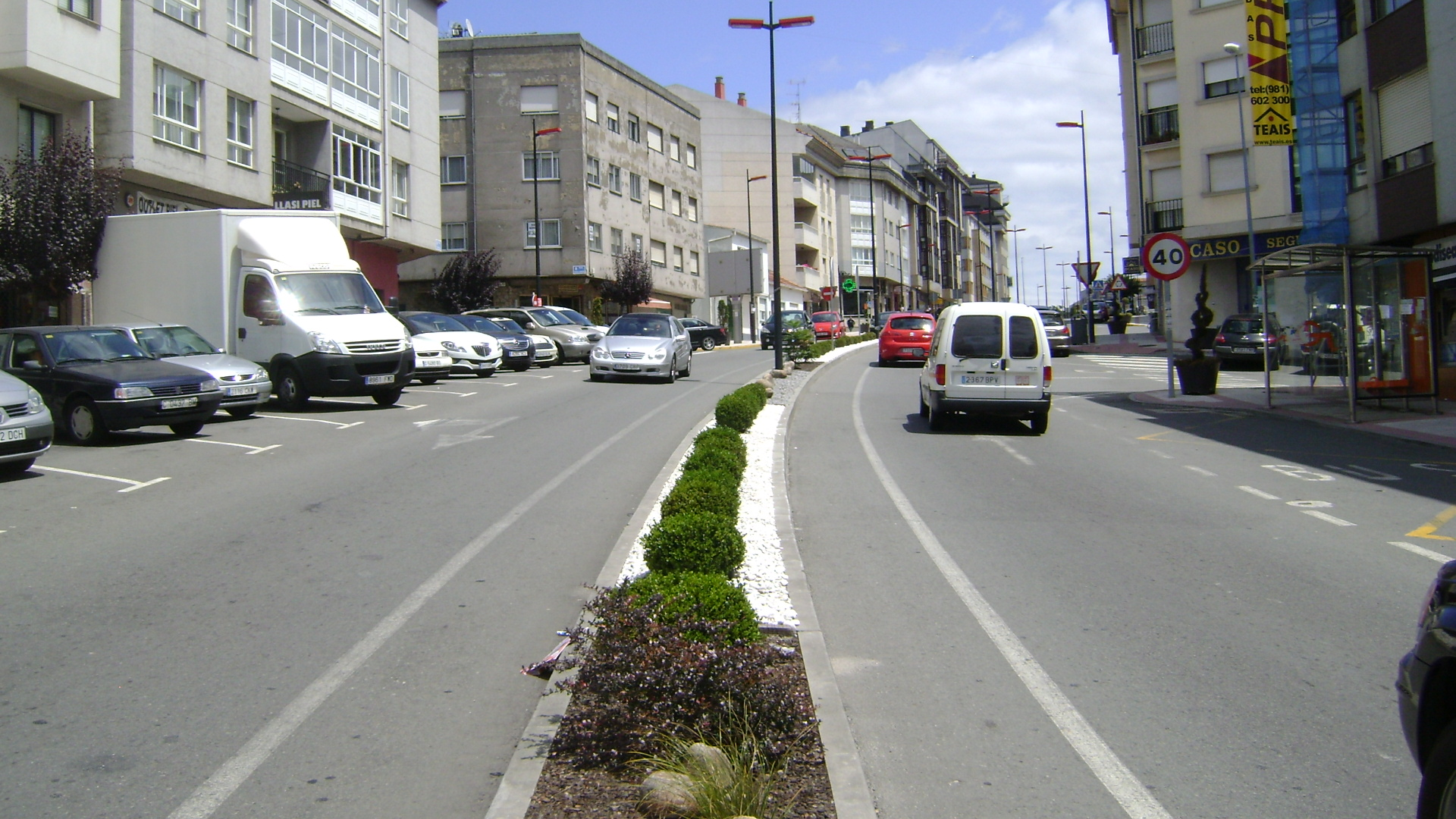 El Temple, Cambre, La Coruña